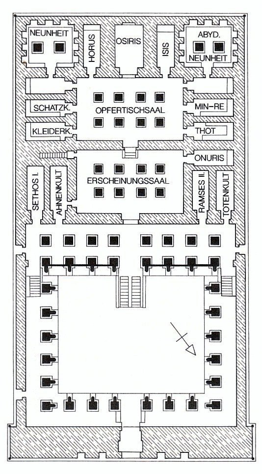 Plan des Millionenjahrhauses Ramses II. in Abydos mit Angabe der Raumfunktionen